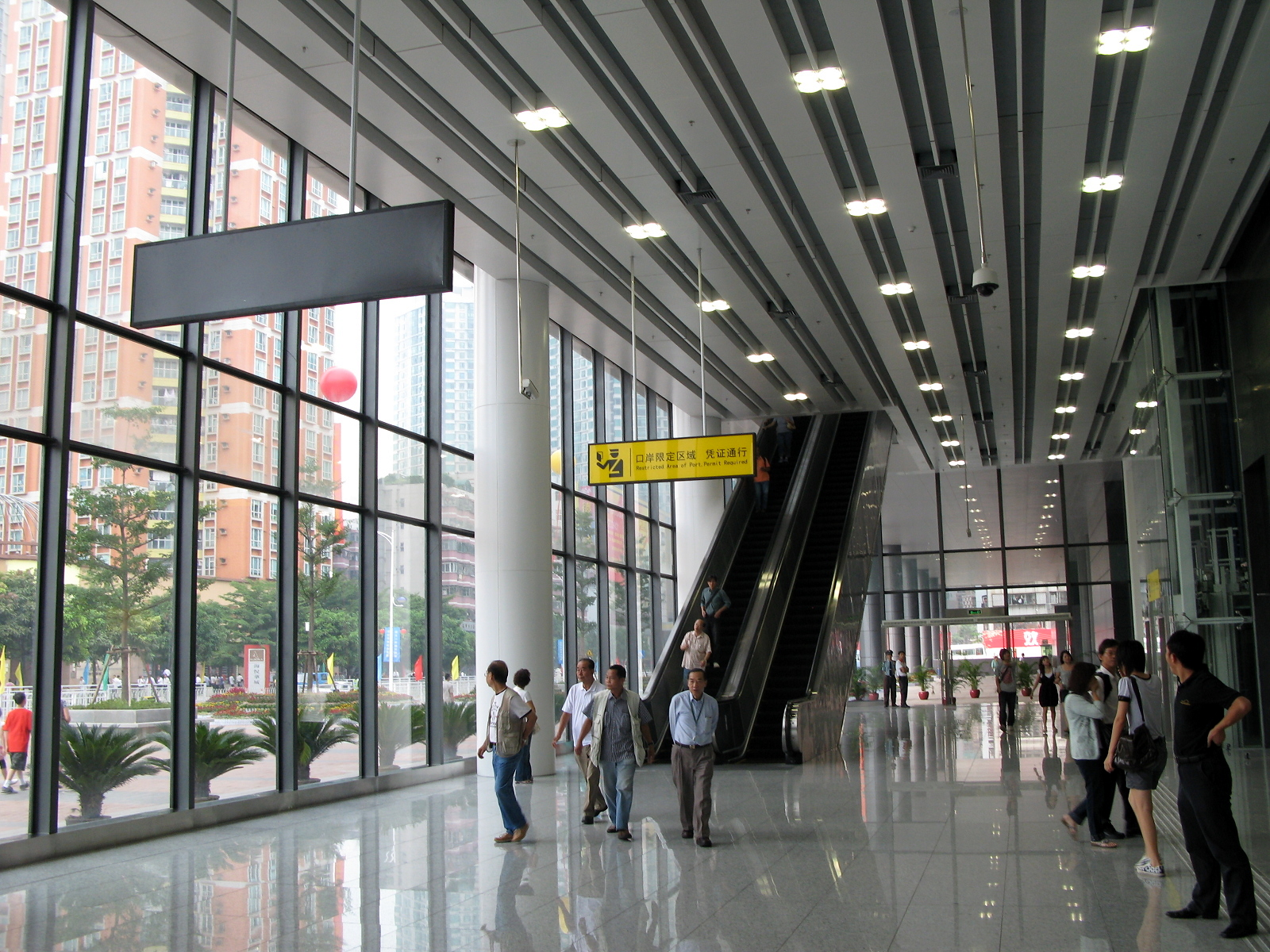 福田口岸內部